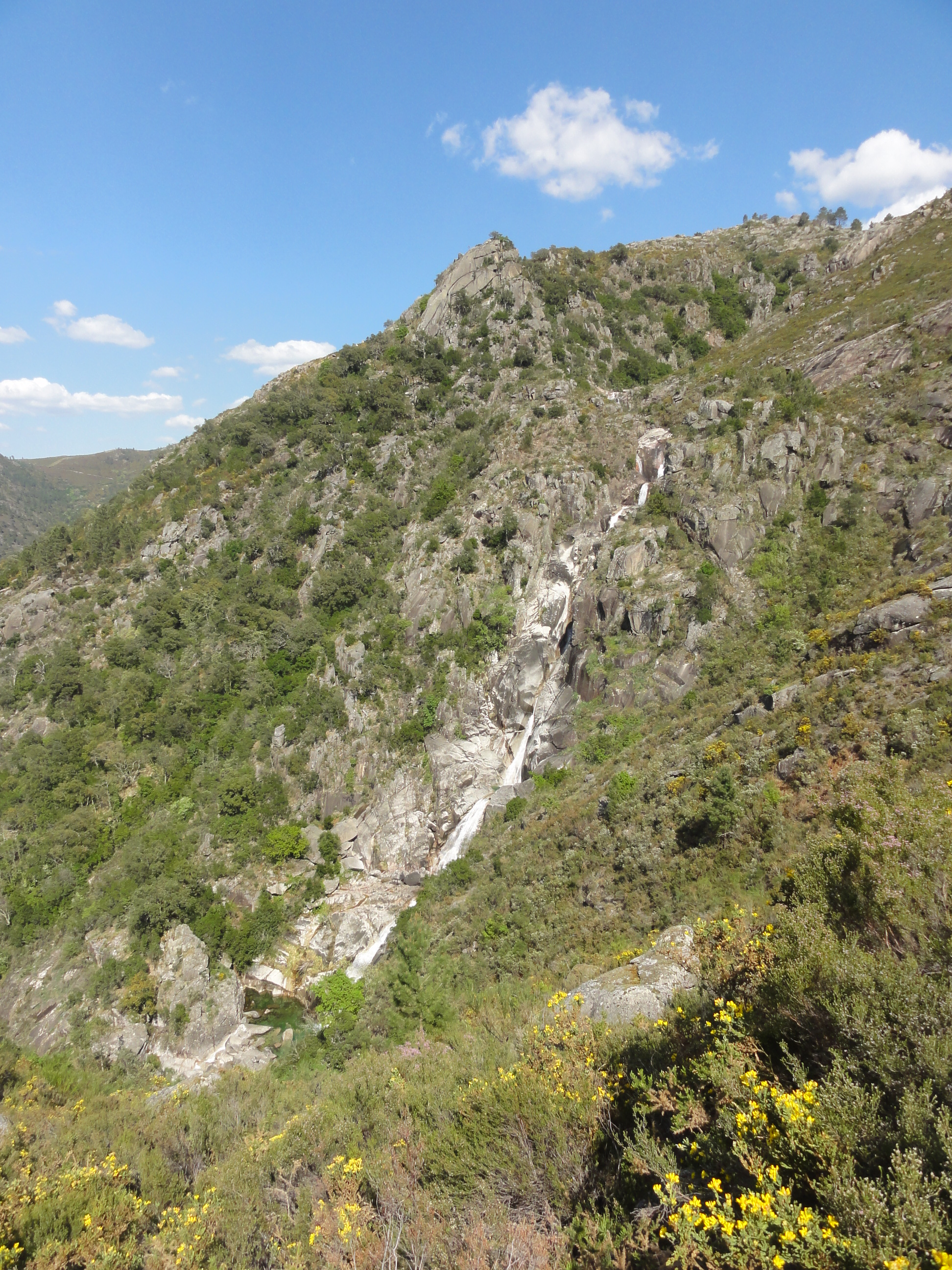 Corga da Fecha This is a photography of a Site of Community Importance in Spain with the ID: ES1130001. Natura2000 entry, EEA entry